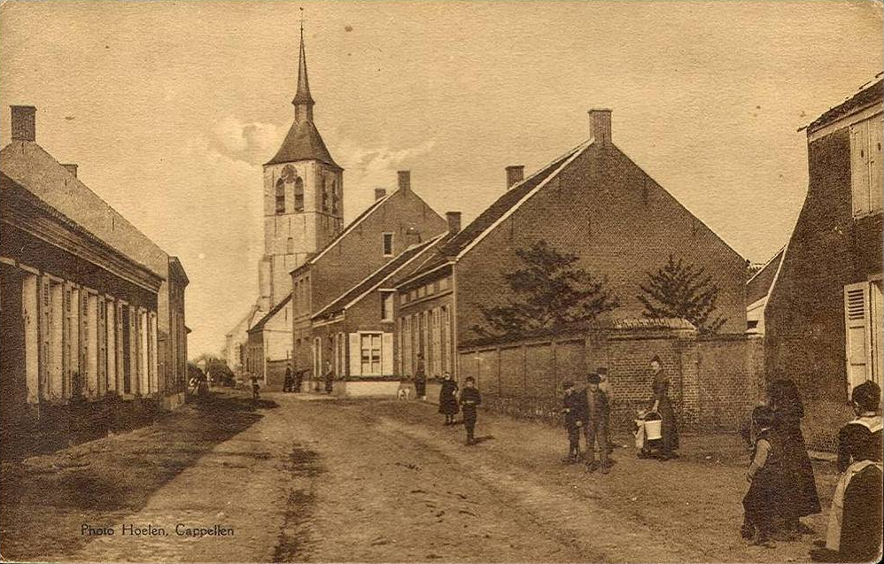 De Dorpstraat in Wilmarsdonk, foto gemaakt in 1899 ten behoeve van de expo van Antwerpen.